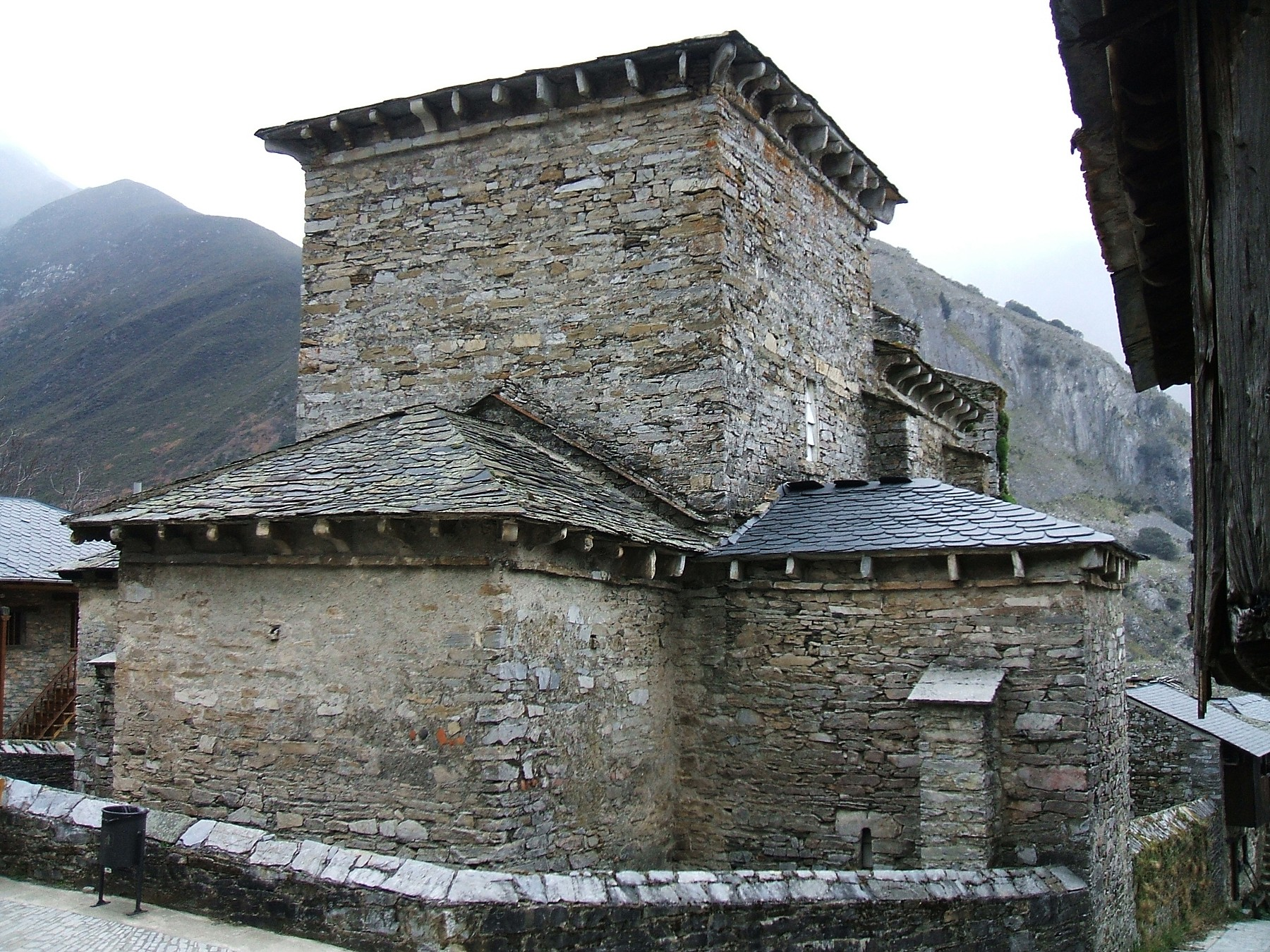 Iglesia mozárabe de Santiago de Peñalba, en Peñalba de Santiago